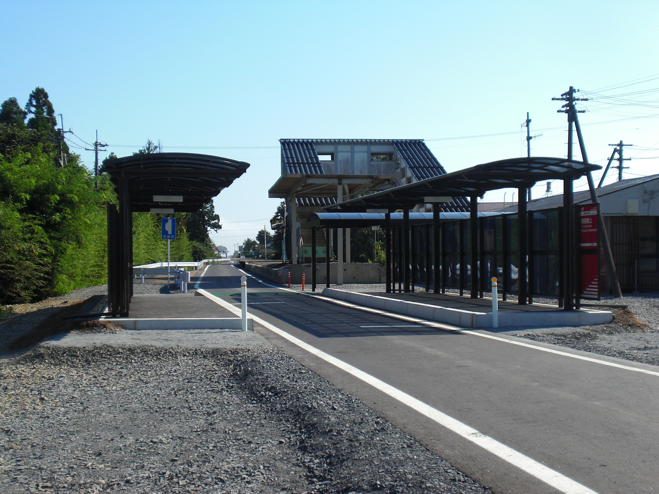 陸前階上駅BRTホーム (後方は旧鉄道ホームと跨線橋)